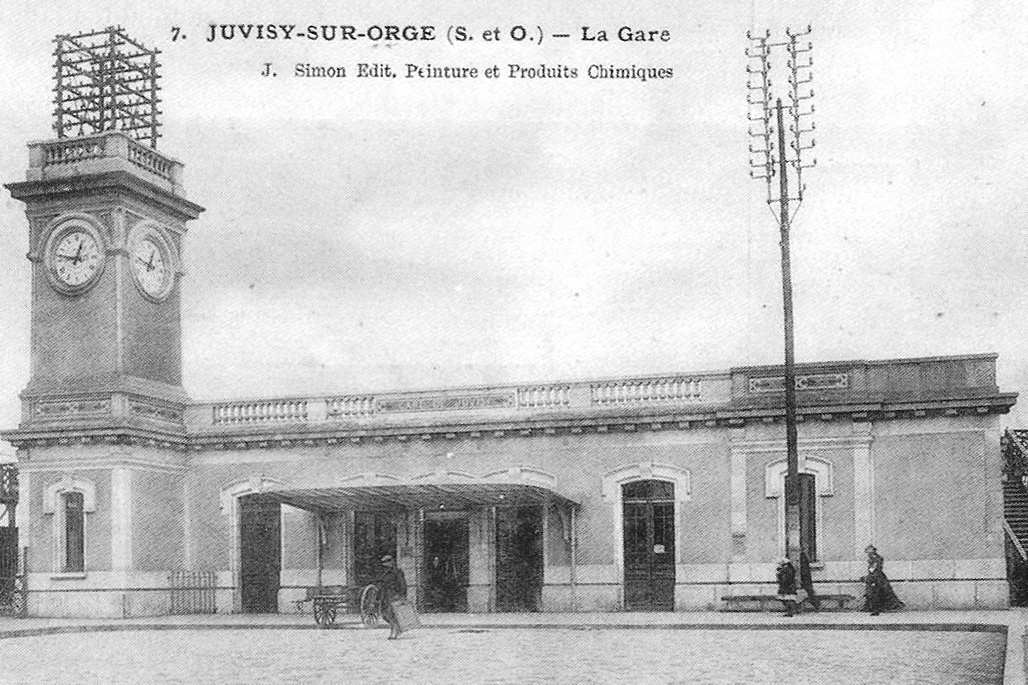 La gare de Juvisy (Essonne), au début du XX° siècle.